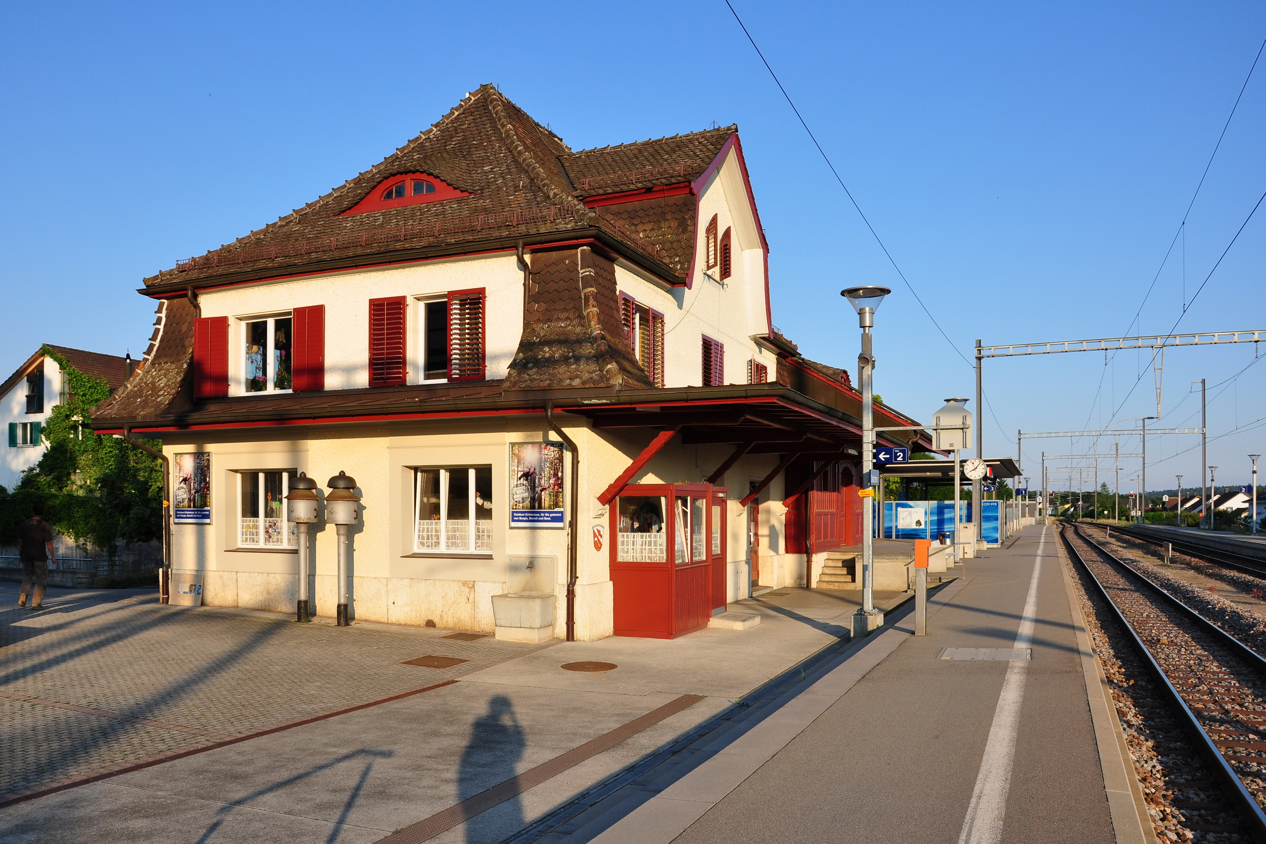 Dachsen (Switzerland)